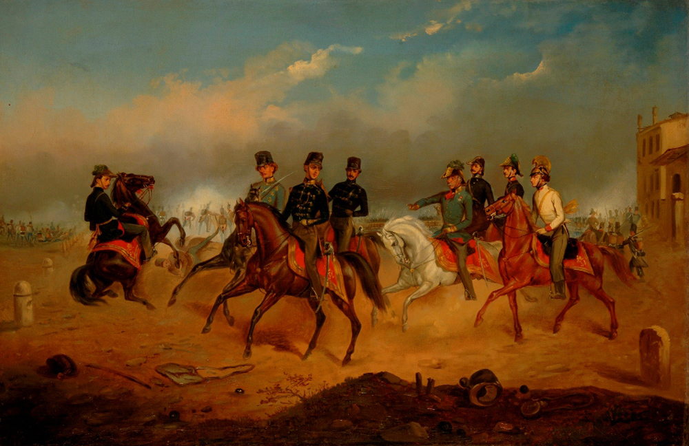 Feuertaufe Erzherzog Franz Joseph´s bei ST. LUCIA/VERONA am 6. Mai 1848, Gemäldebestand des HGM, Inv.Nr.1950-15-BI2829 2